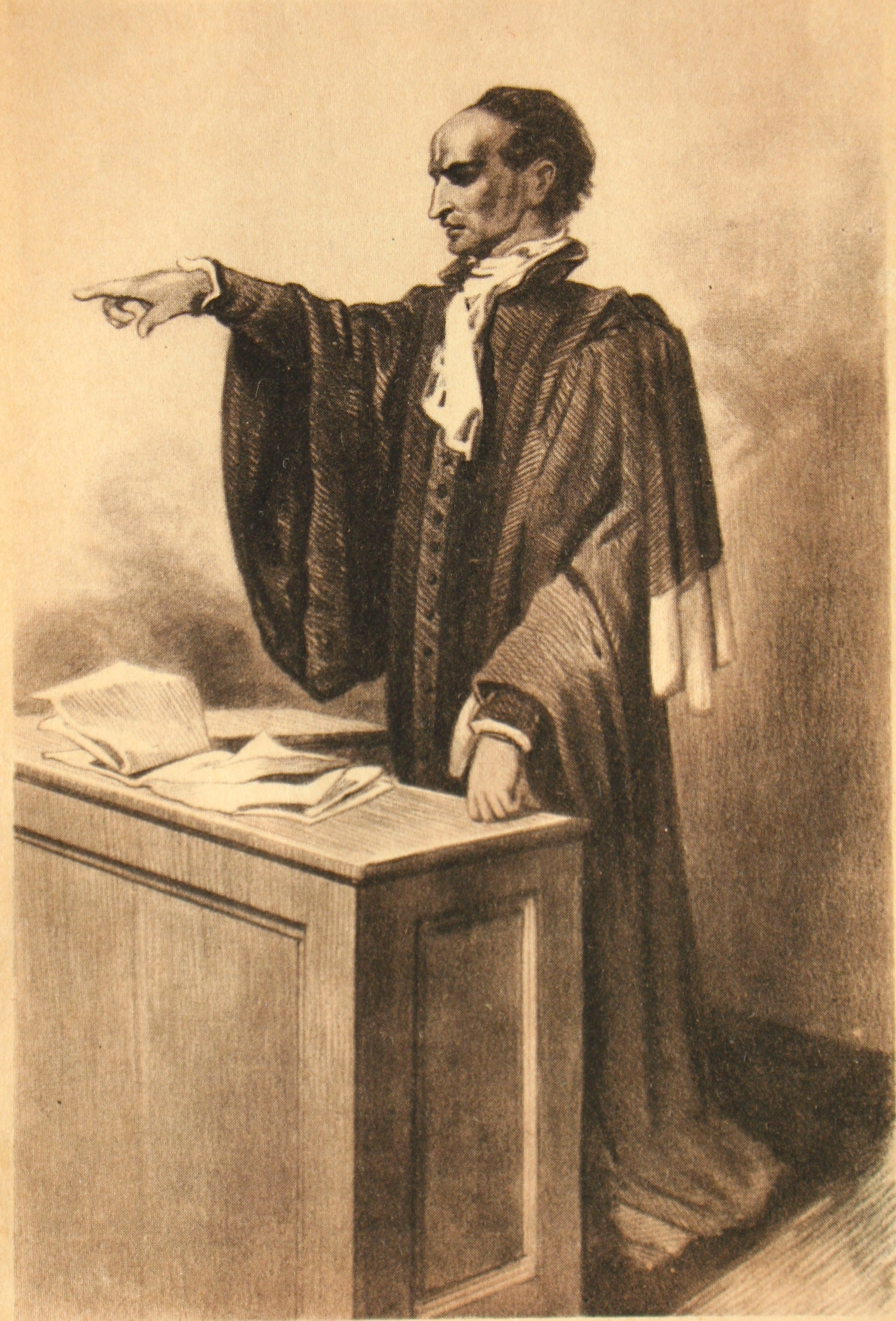 Paul Gavarni picture pour Monte Cristo d'Alexandre Dumas. Поль Гаварни. Королевский прокурор de Вильфор. Рисунок из издания романа 1846 года, репродуцированный в московском издании.